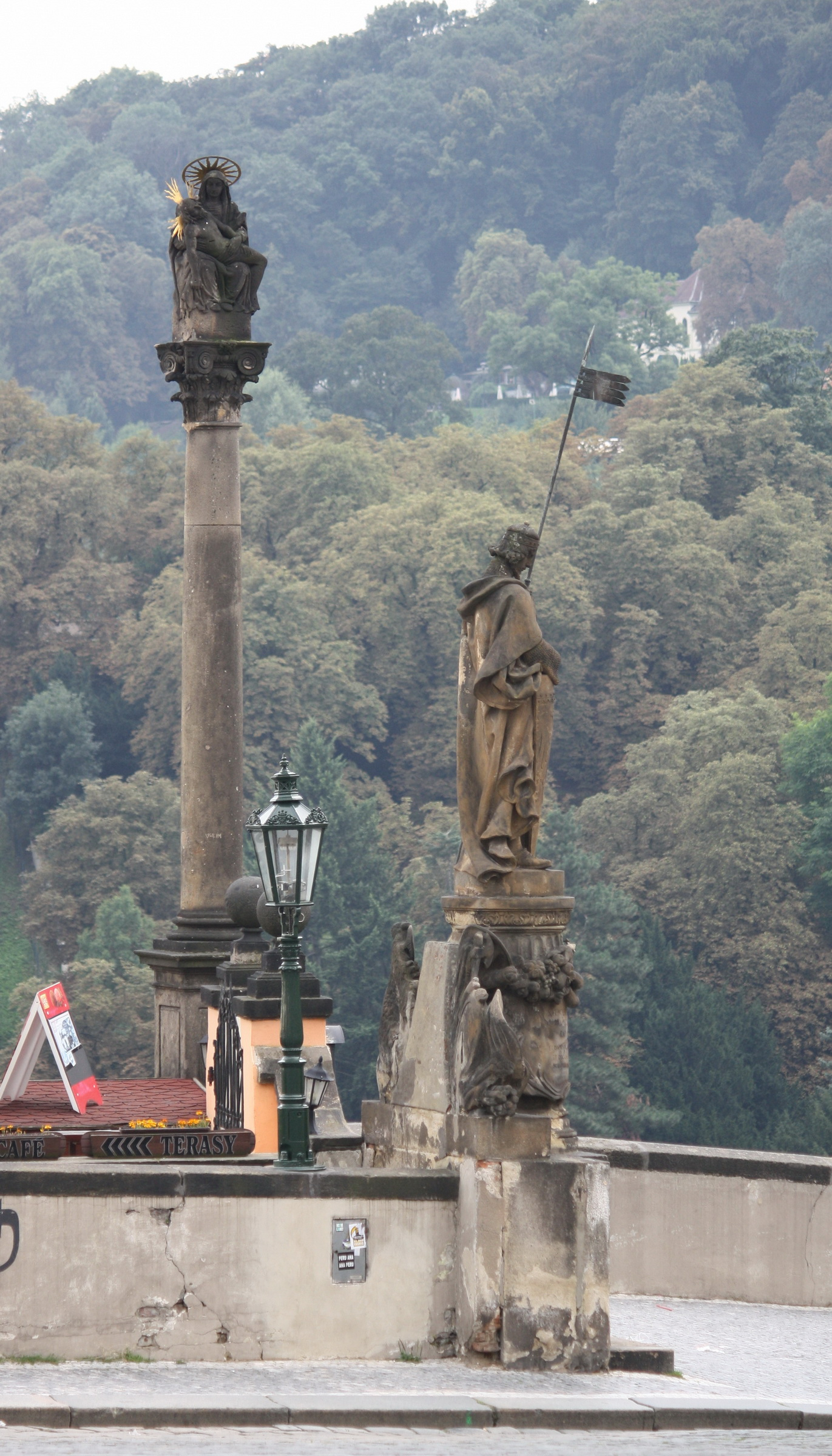 Čeněk Vosmík: Socha svatého Václava a socha Panny Marie Einsiedelnské, Praha, Hradčanské náměstí.